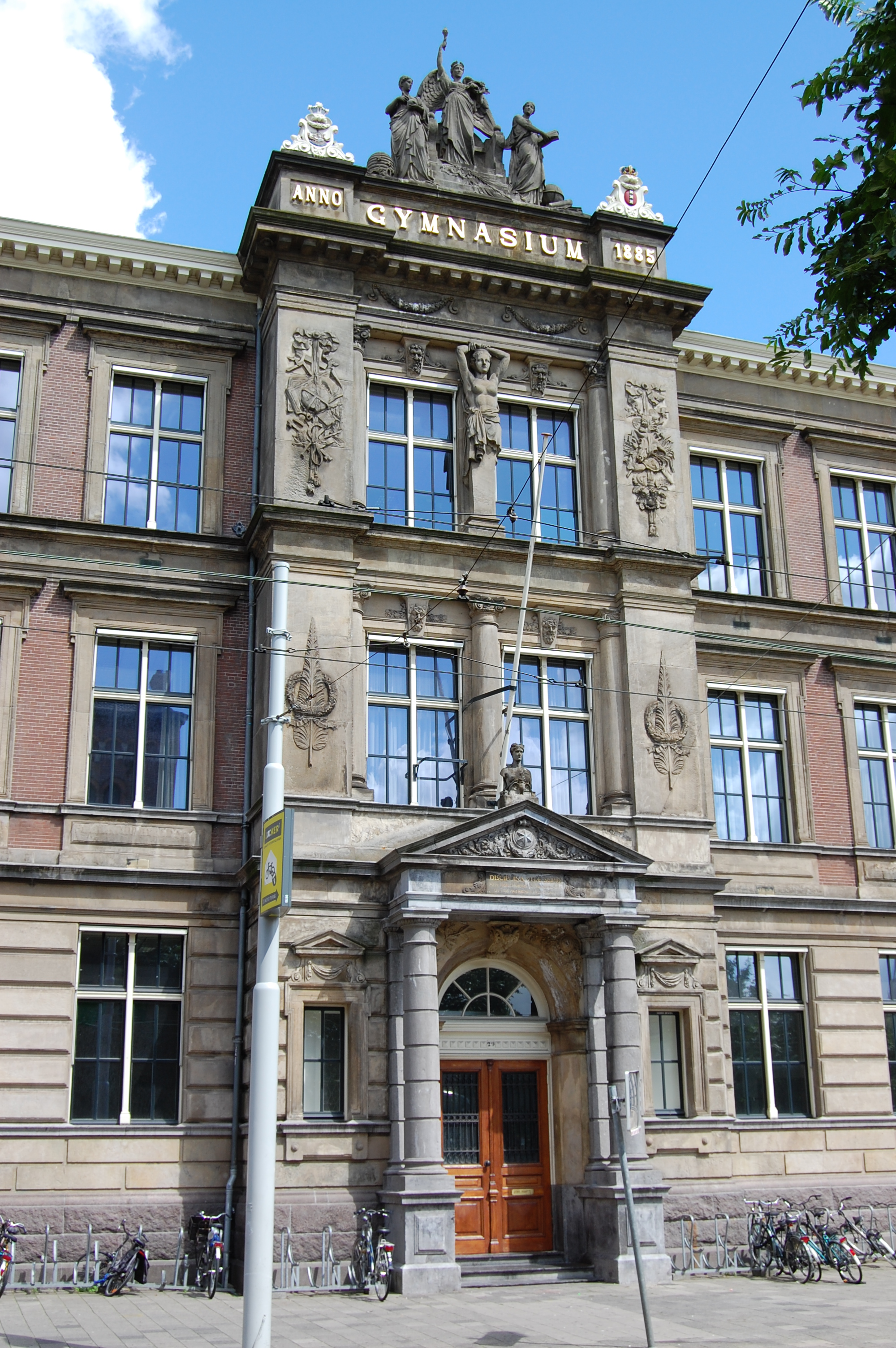 Barlaeus Gymnasium Amsterdam voorgevel